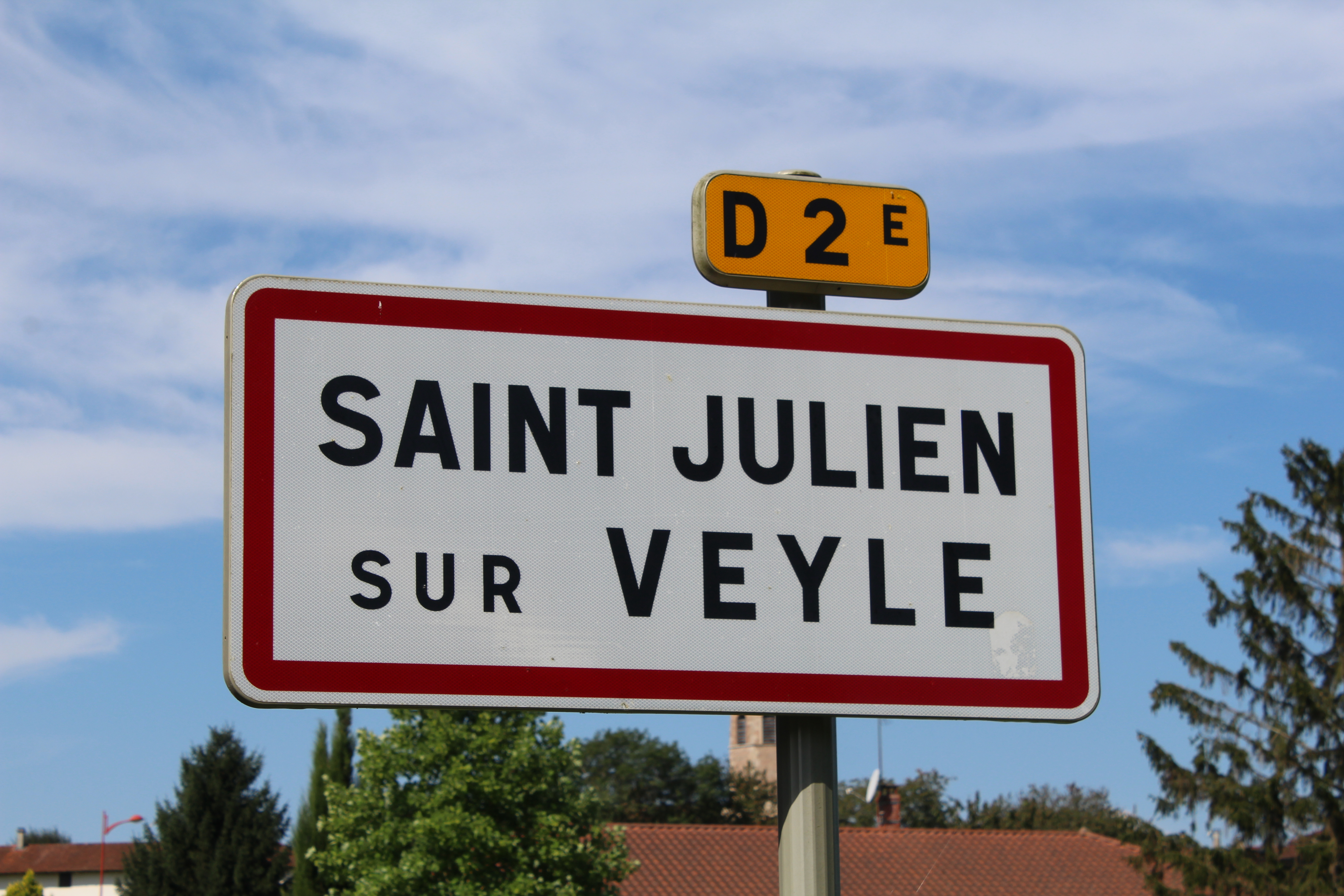 Panneau d'entrée dans Saint-Julien-sur-Veyle.